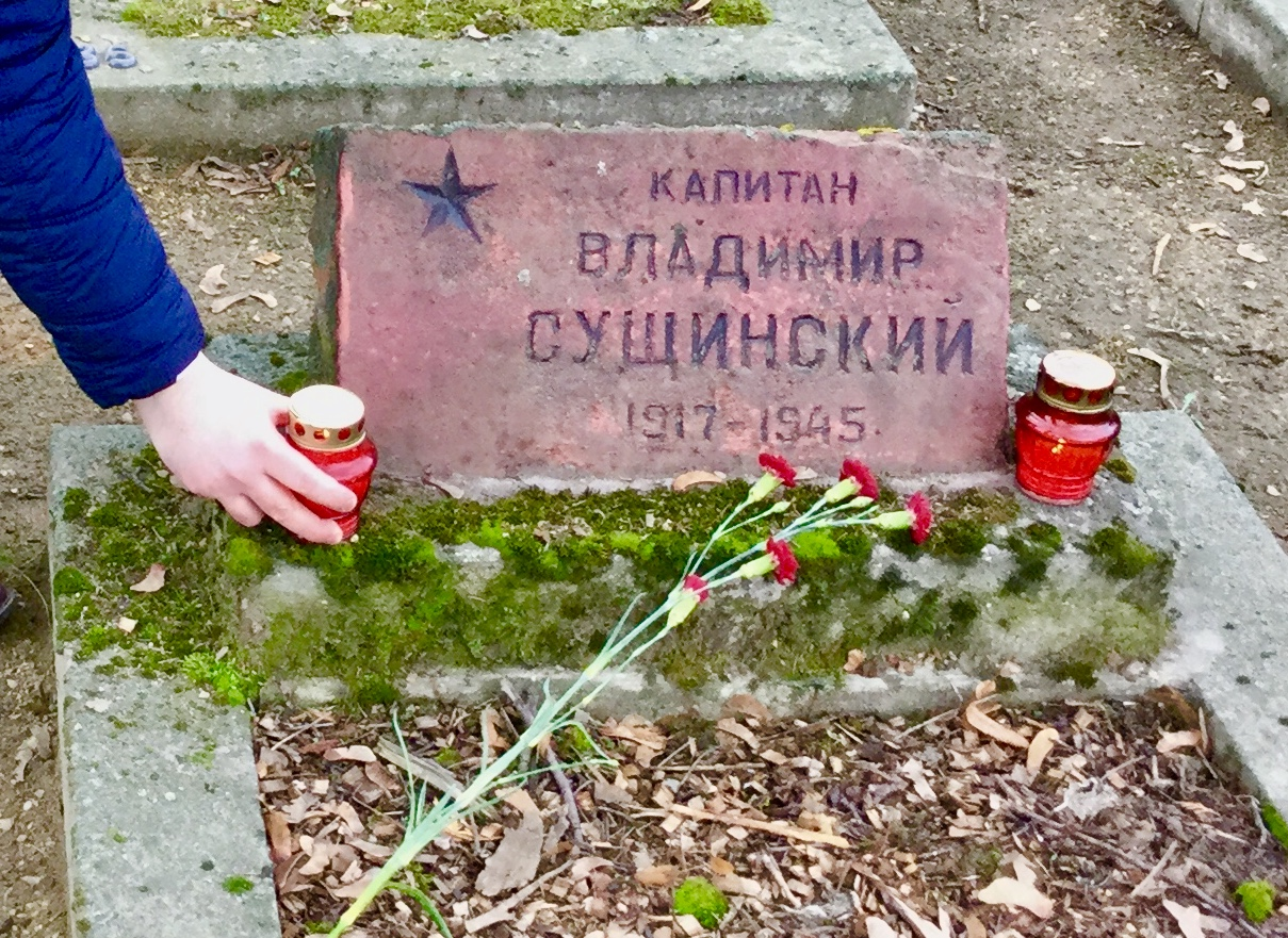 Могила на кладбище Куле, Ченстохова